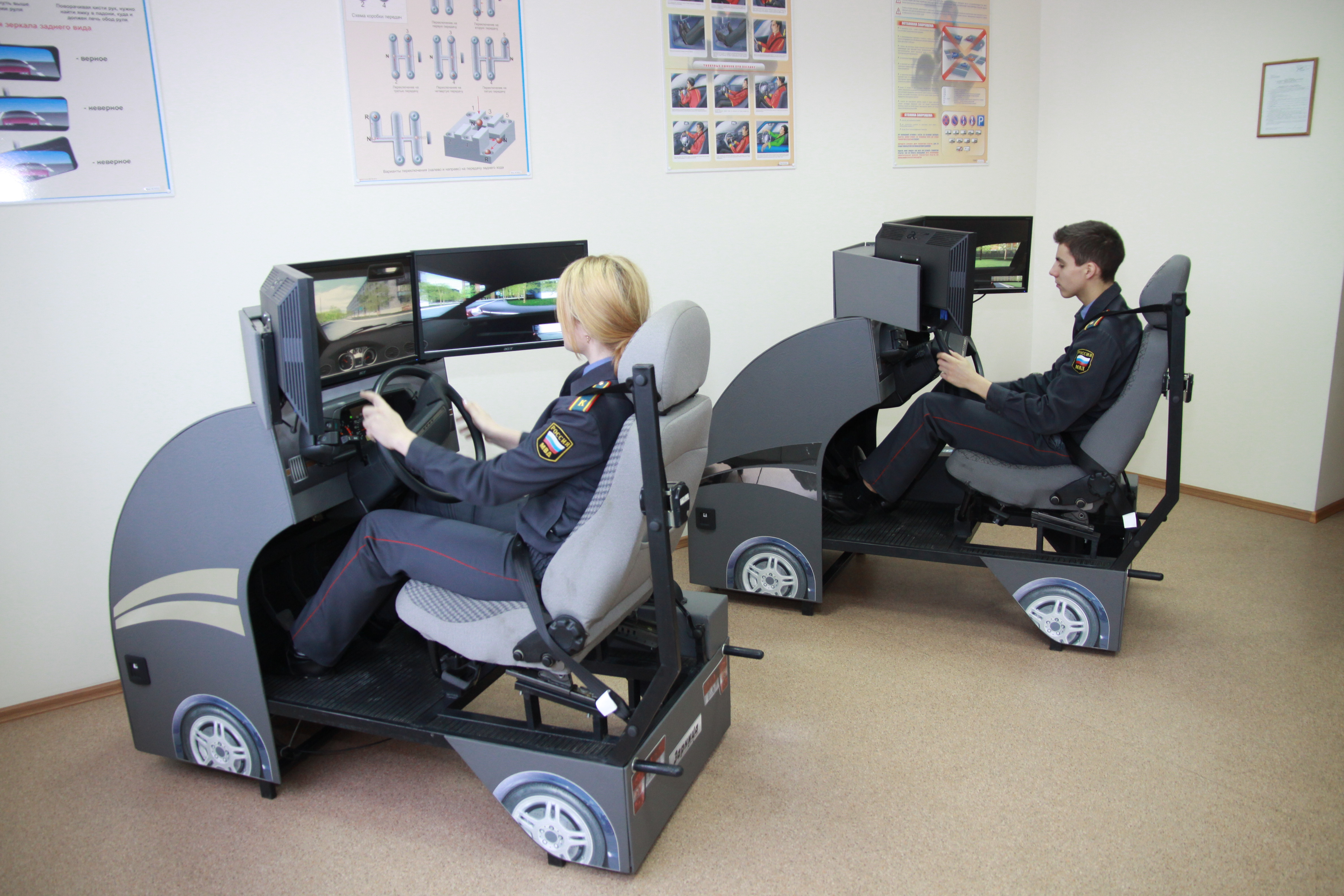 Тренажерный класс приобретения первоначальных навыков управления транспортным средством